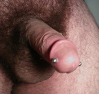 Ampallang Piercing (RDW 2007)